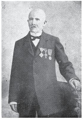 Иван Шумков.